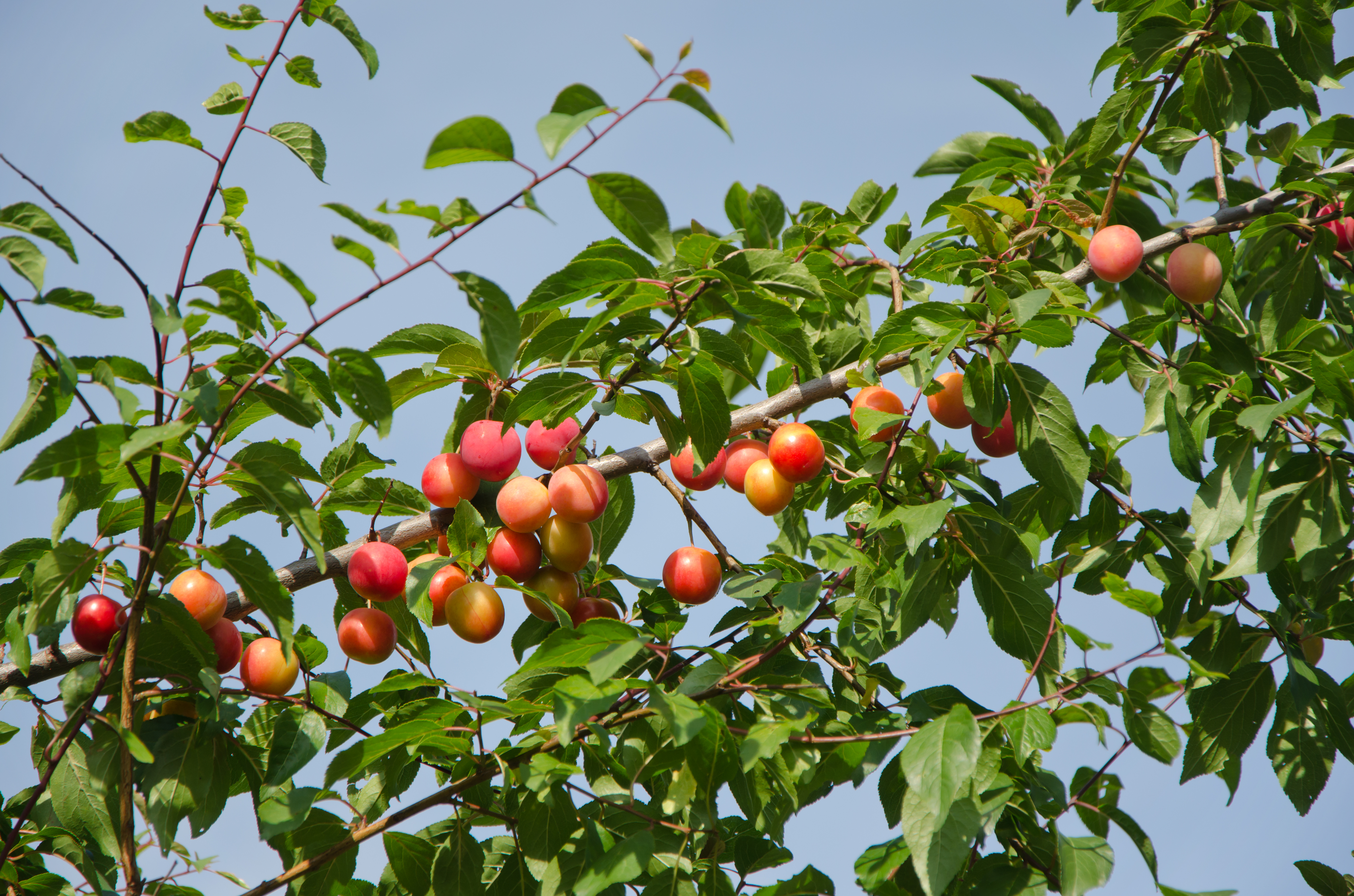 Wildpflaume